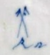 Signatur der Porzellanmanufaktur Rauenstein von 1850-1897